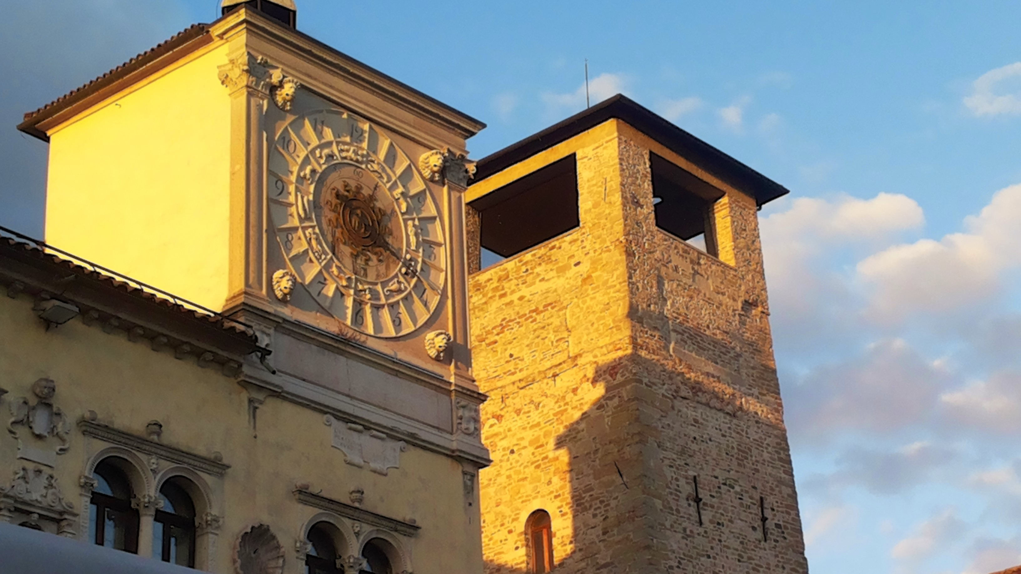 Scorcio delle torri del Palazzo dei Rettori e dell'Auditorium